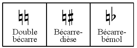 Auteur : Yves30 ( Division des altérations doubles en altérations usuelles et altérations désuètes (celles composées d'un bécarre). Cette image correspond à la seconde catégorie.